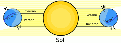 Como funcionan las estaciones del año. Imagen creada con Inkscape y retocada con The Gimp. Categoría:Astronomía (imagen) Category:Earth_sciences